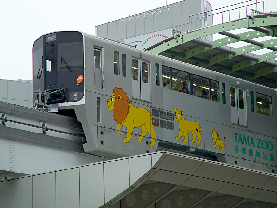 Tama Toshi Monorail Line, Tachikawa, Tokyo, Japan